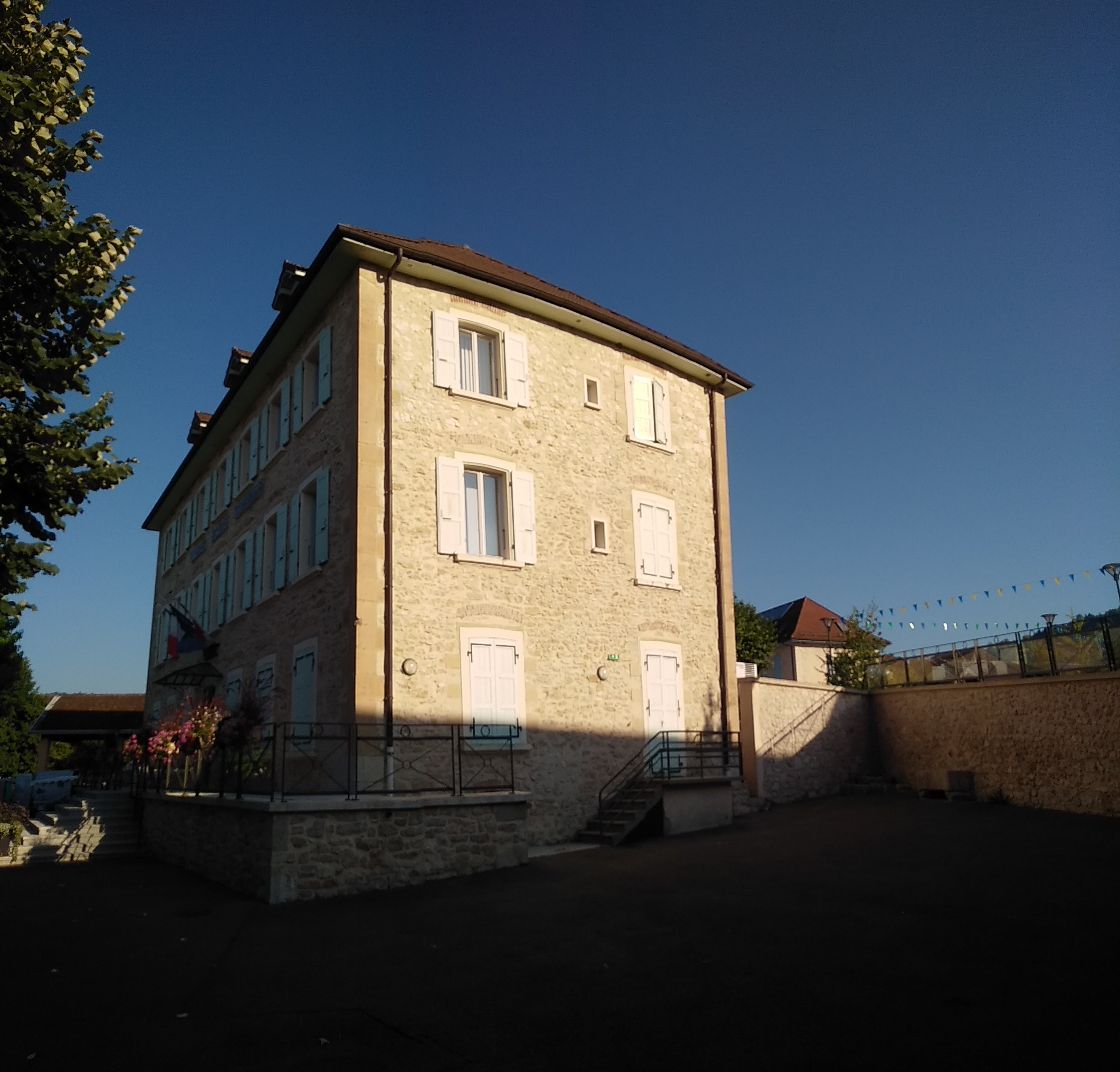 Novalaise(Savoie): la mairie